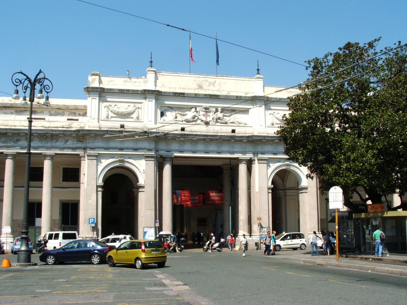 Stazione ferroviaria di Genova Piazza Principe